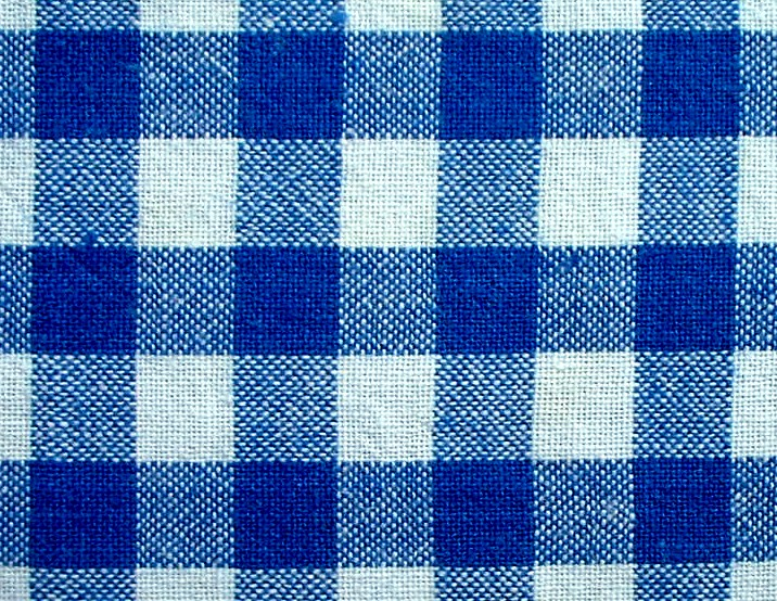 Züchen